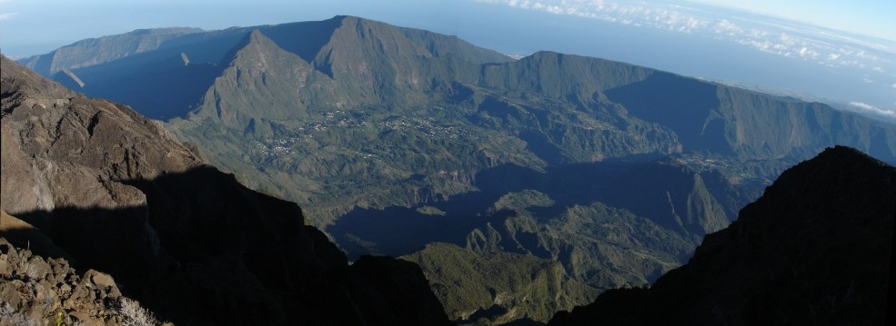 Description: Cirque de Salazie, La Réunion, novembre 2004. Source: Bouba